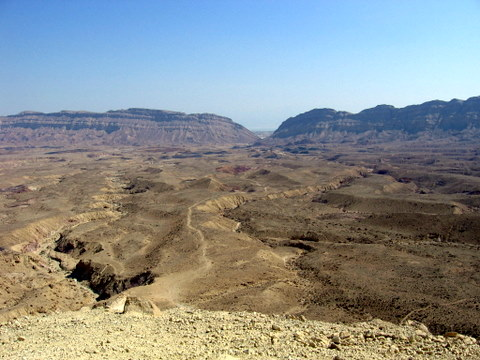 ali rise